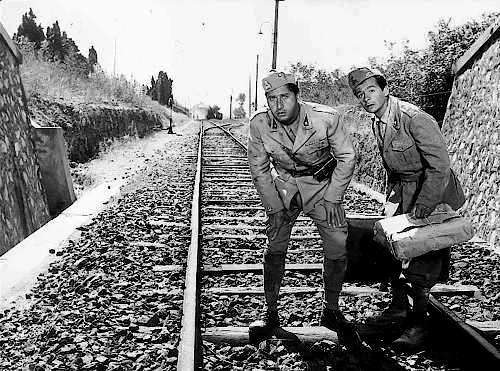 Categoria:Immagini di Alberto Sordi